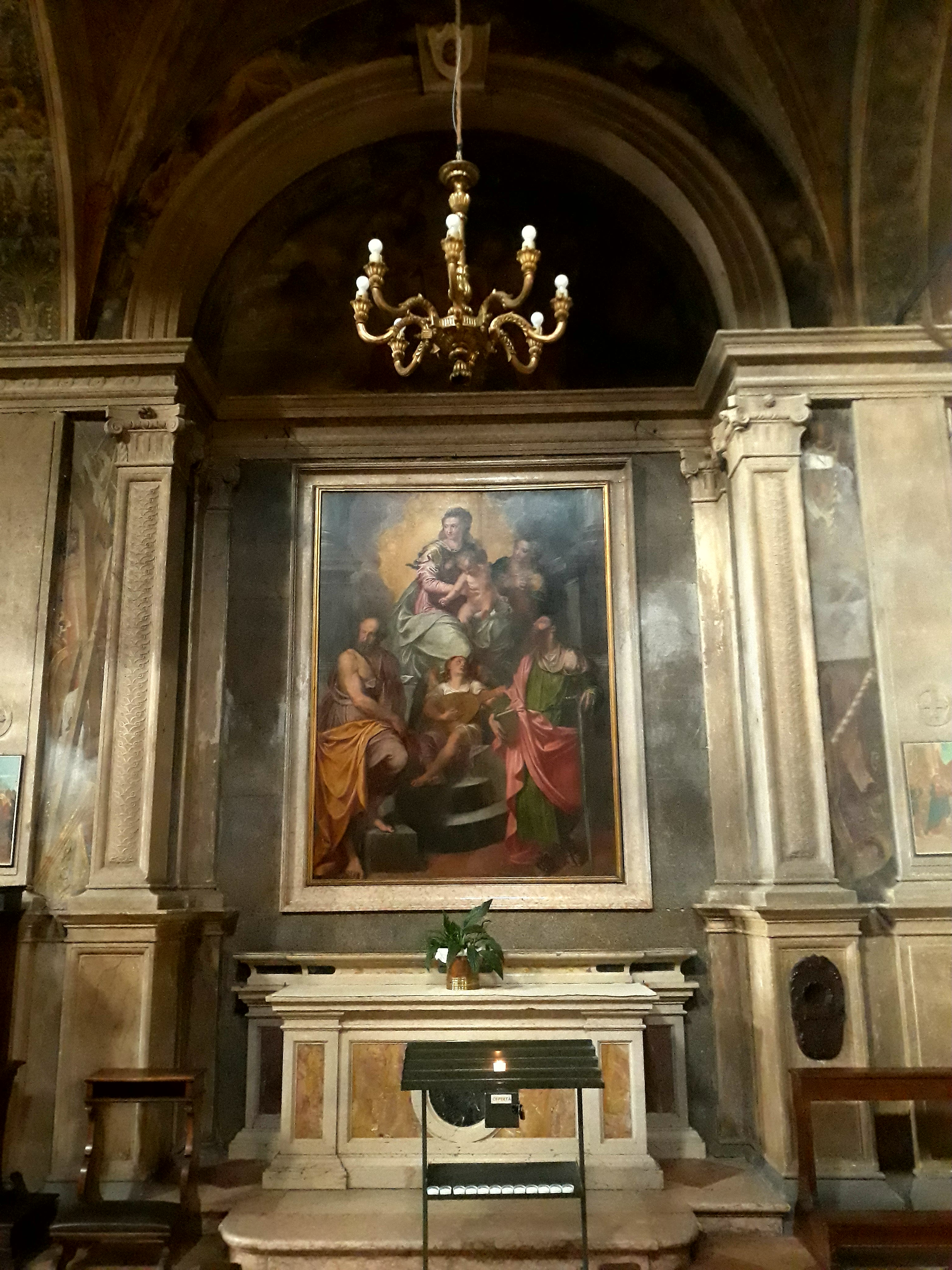 Domenico Brusasorzi - Madonna con Bambino. chiesa dei Santissimi Nazaro e Celso a Verona